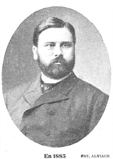 Retrato de Raimundo Fernández Villaverde hacia 1885, publicado en la revista española Nuevo Mundo.